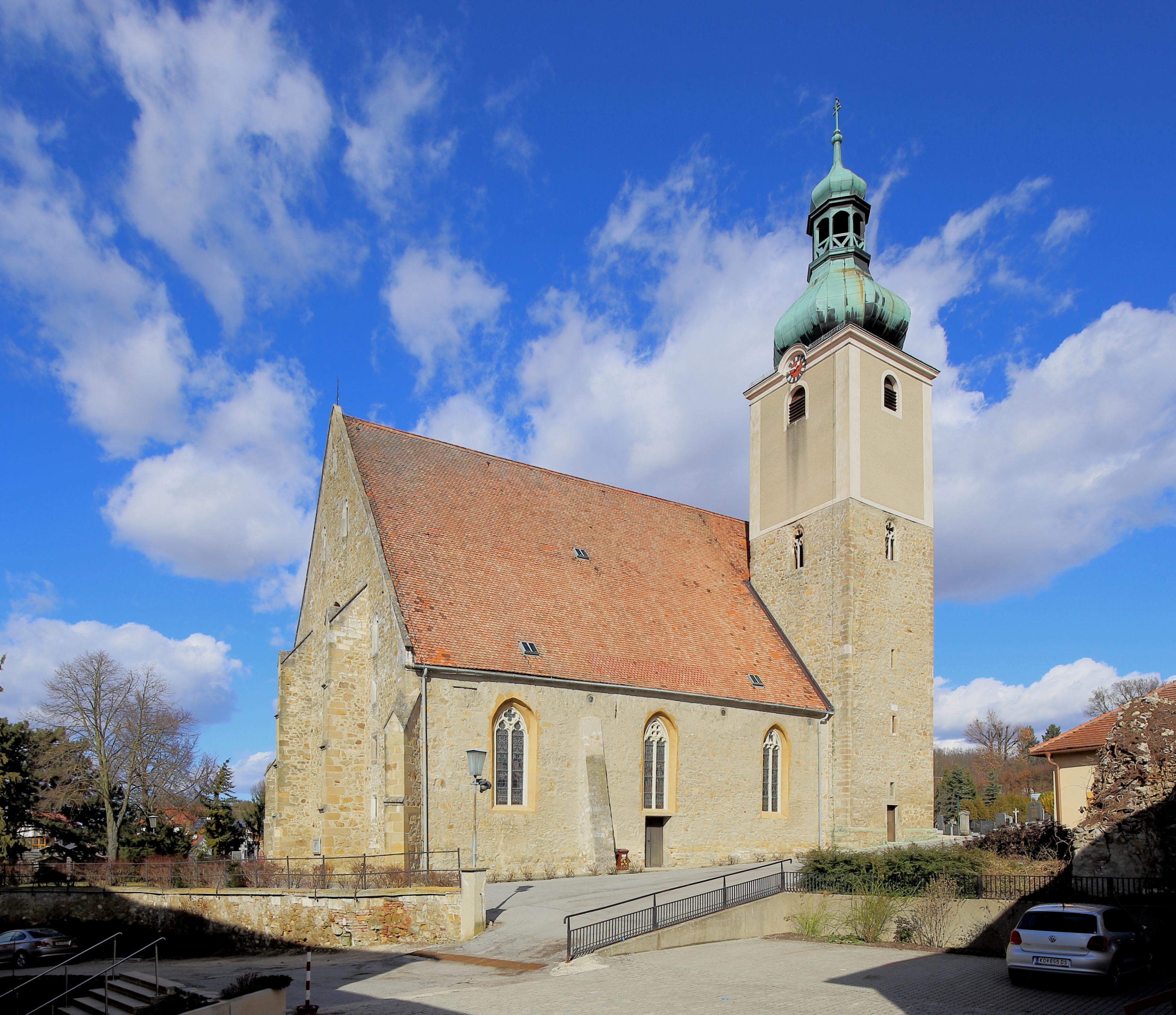 Südansicht der röm.-kath. Pfarrkirche hl. Valentin in der niederösterreichischen Marktgemeinde Großrußbach. Eine ehemalige Wehrkirche mit einem dreijochigen Langhaus aus der 2. Hälfte des 15. Jahrhunderts. Der zweijochige, polygonale Chor zwischen dem spätgotischen Turm und der Sakristei stammt vermutlich aus der 2. Hälfte des 14. Jahrhundert.